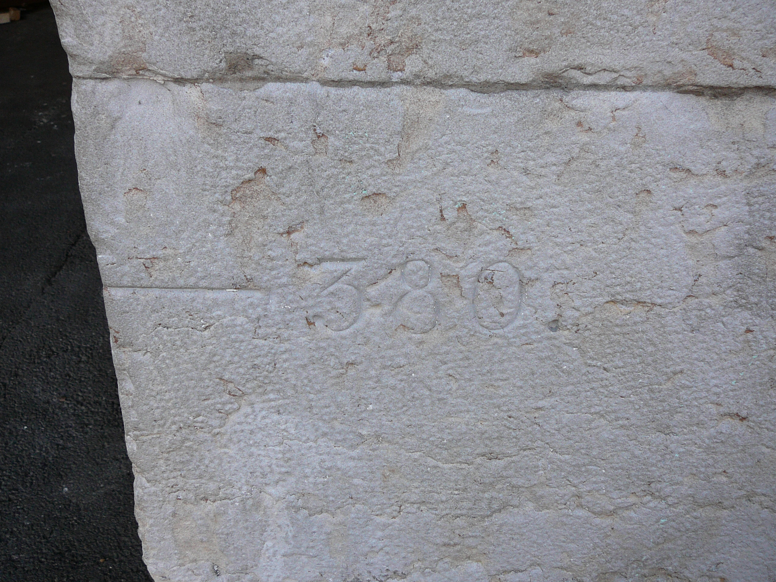 Nombre gravé dans la pierre près de l'entrée du fort Saint-Irénée à Lyon, à 1 mètre du sol. Il ne peut s'agir de l'altitude, trop grande pour cet endroit.